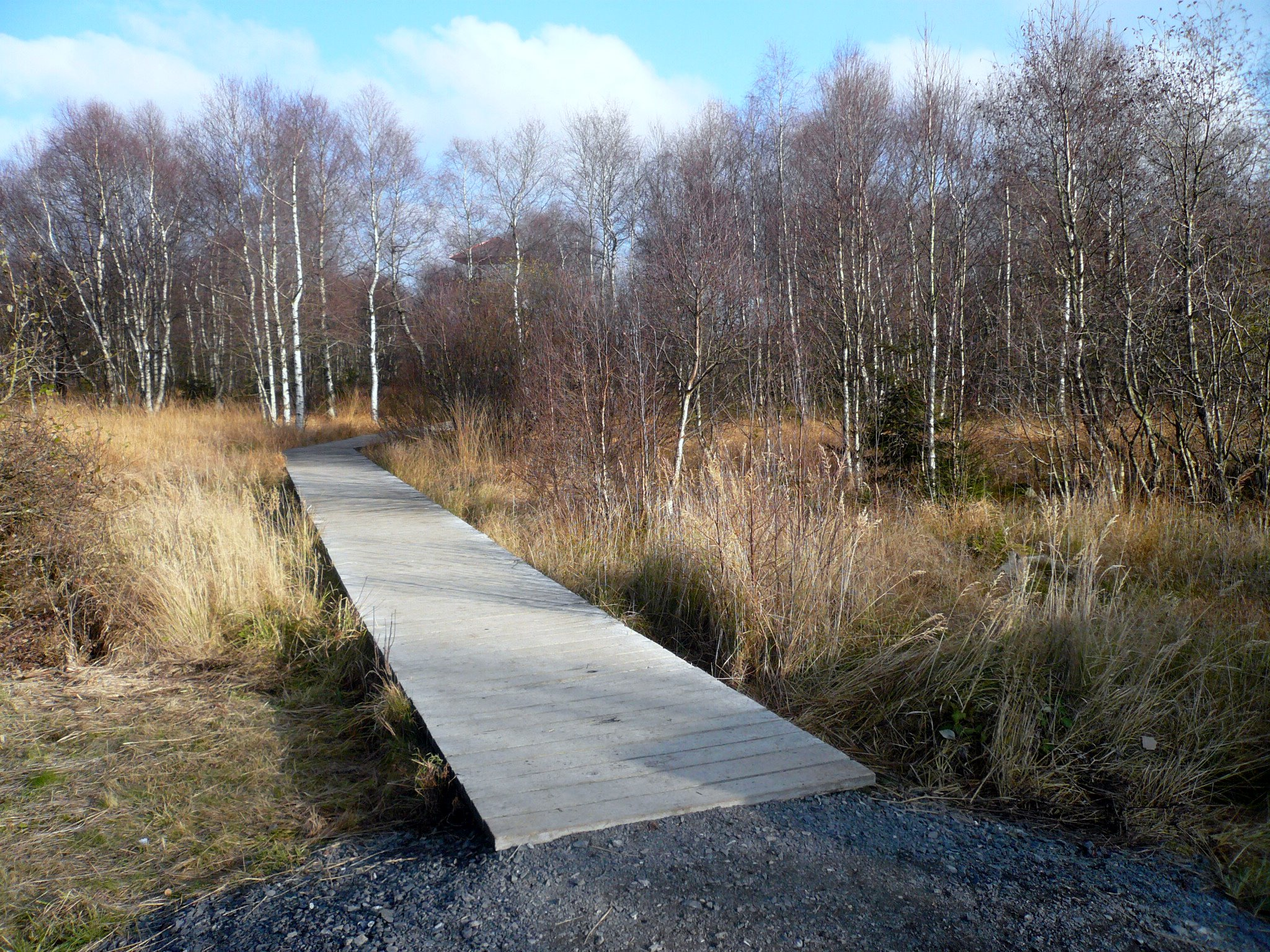 Rotes Moor, Ausgang